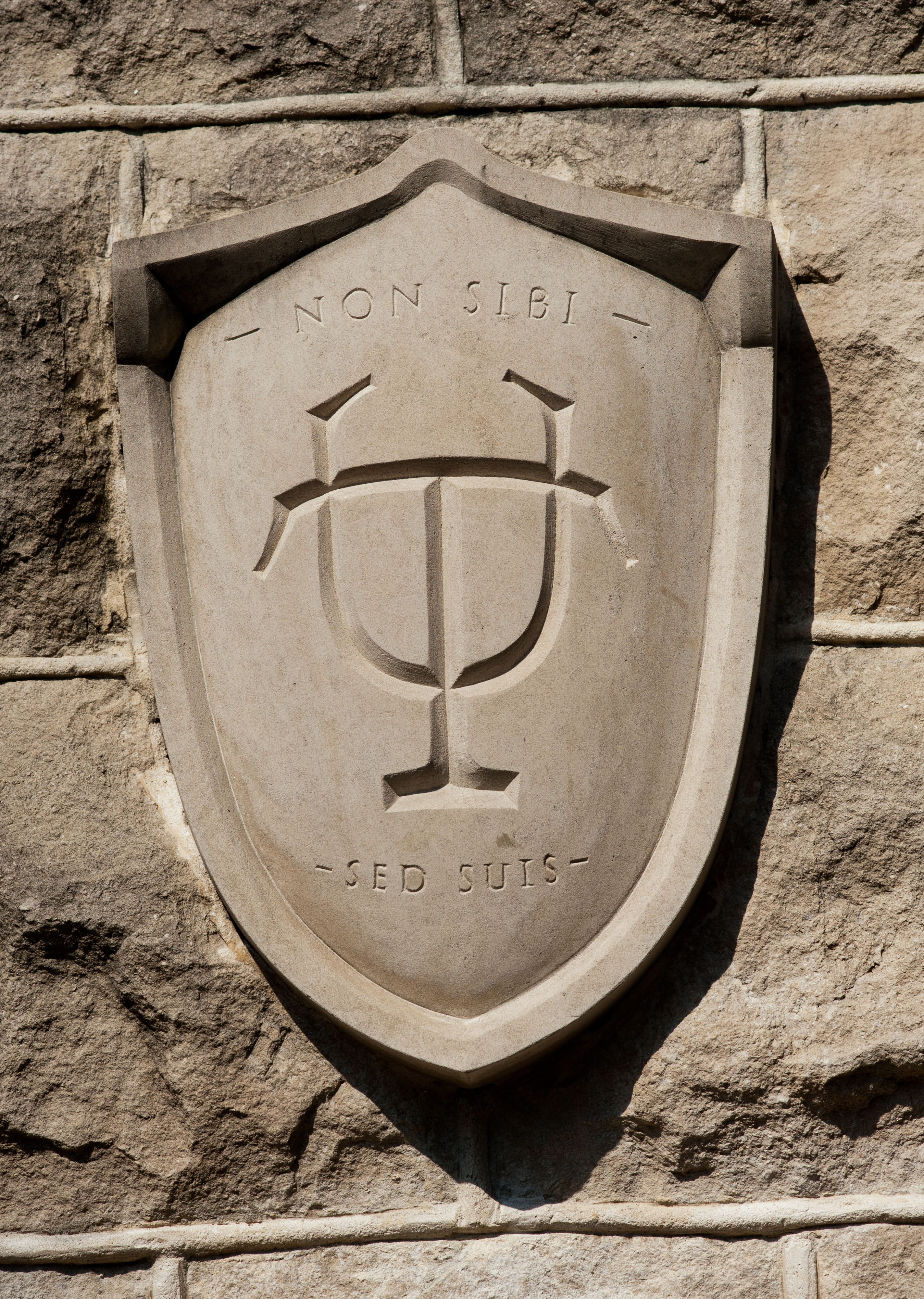 Campus-3